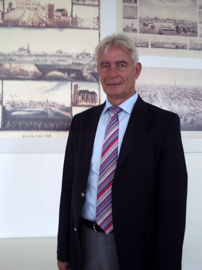 Hans-Peter Neuhaus 2007